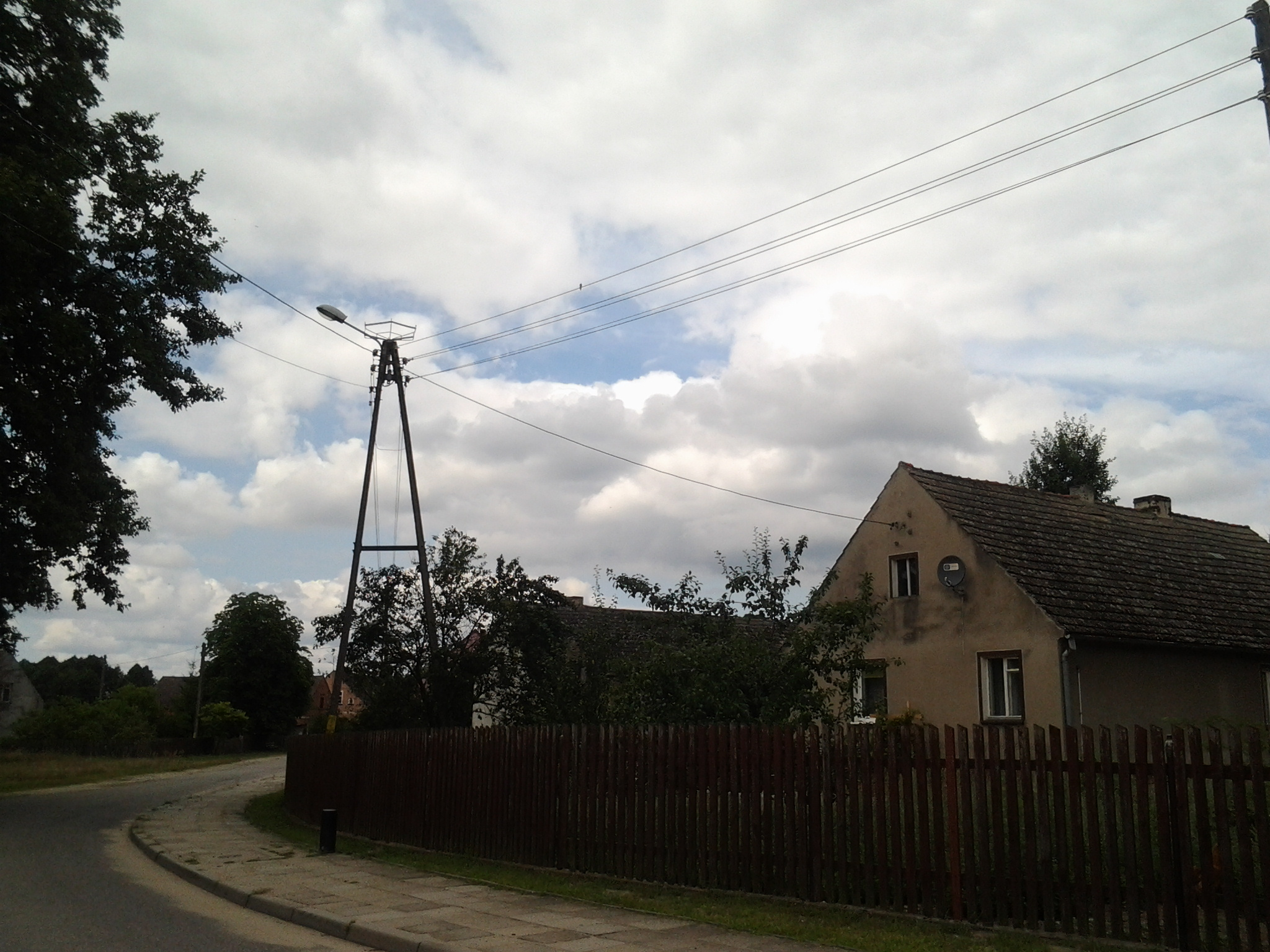 Bocianie gniazdo w Miłowie